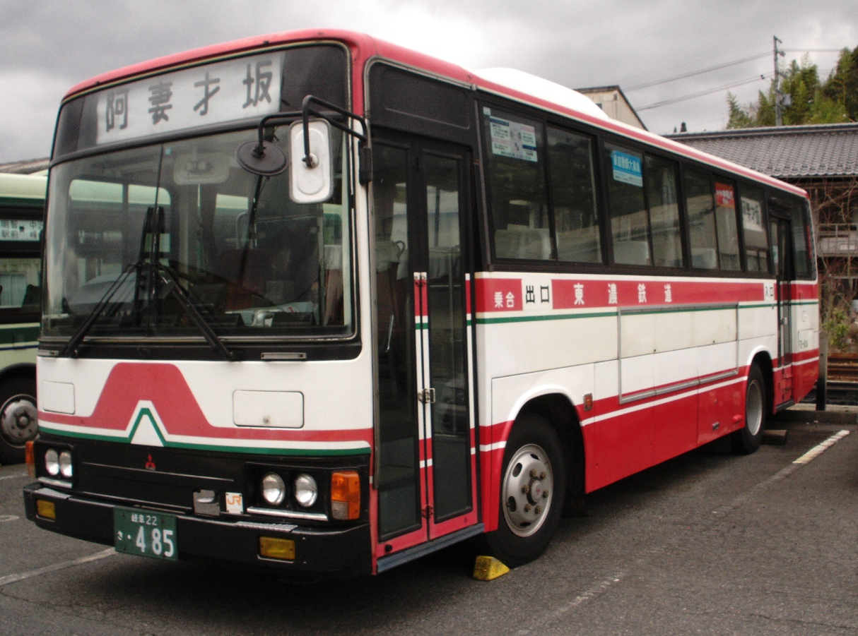 東濃鉄道の一般バス。（名鉄グループカラー） 明知鉄道明智駅前にて 投稿者(Rsa)による撮影。 （2007年3月31日 ）